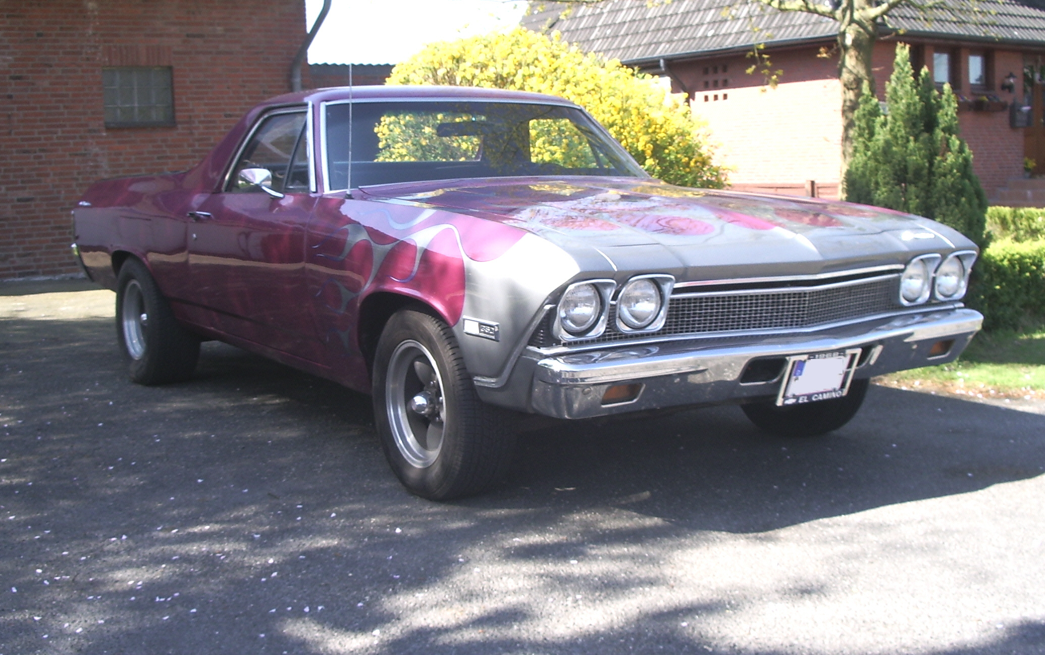 Chevrolet El Camino, Baujahr 1968